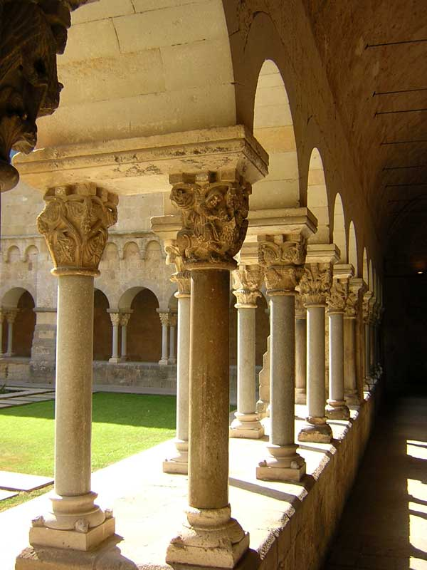 Claustre de Sant Cugat del Vallès